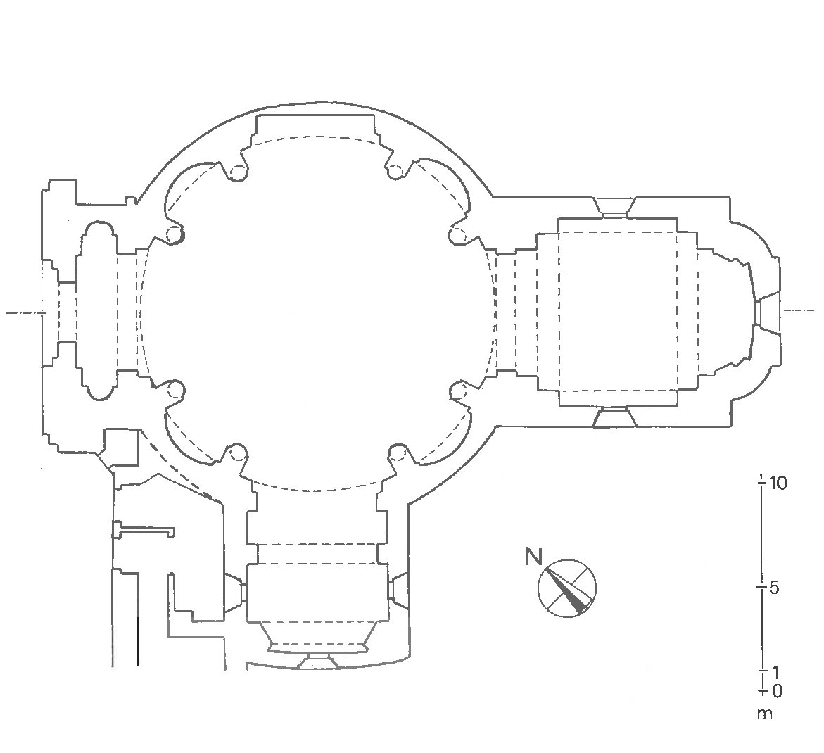 Pianta del progetto di recupero del 1837 di Santa Gersusalemme